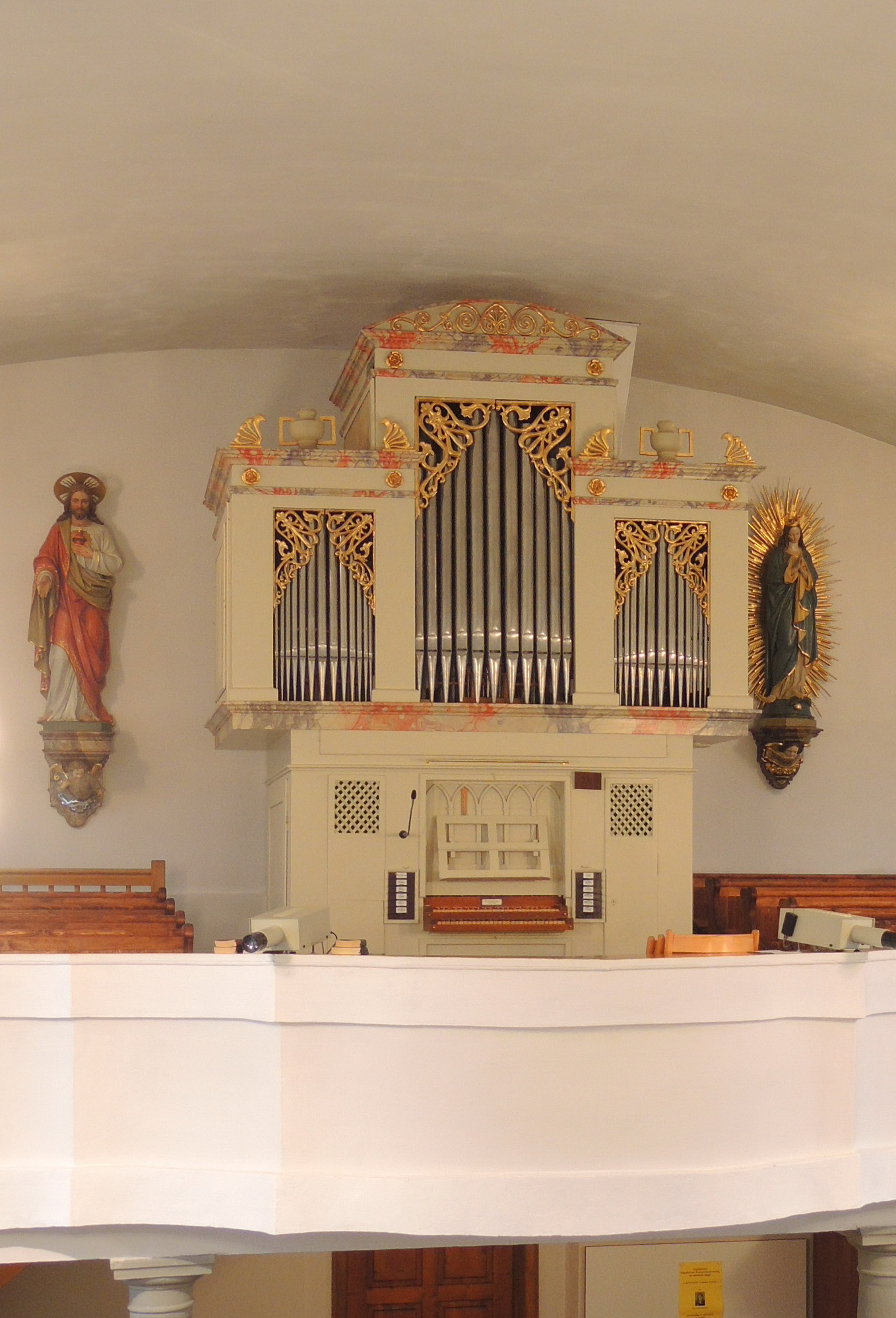 Historische Edenhofer-Orgel von 1854